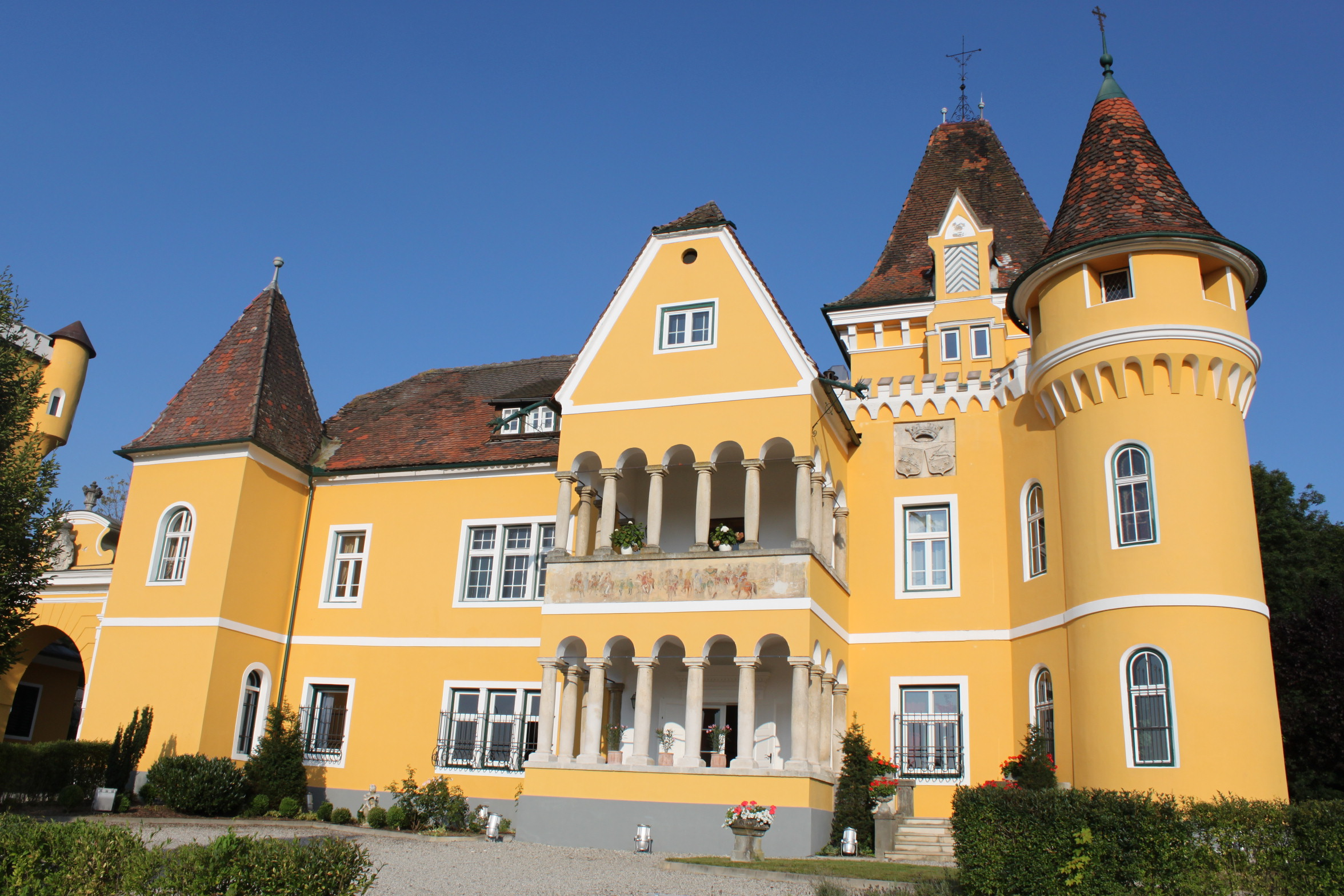 Georgi Schloss, Ansicht von vorne.